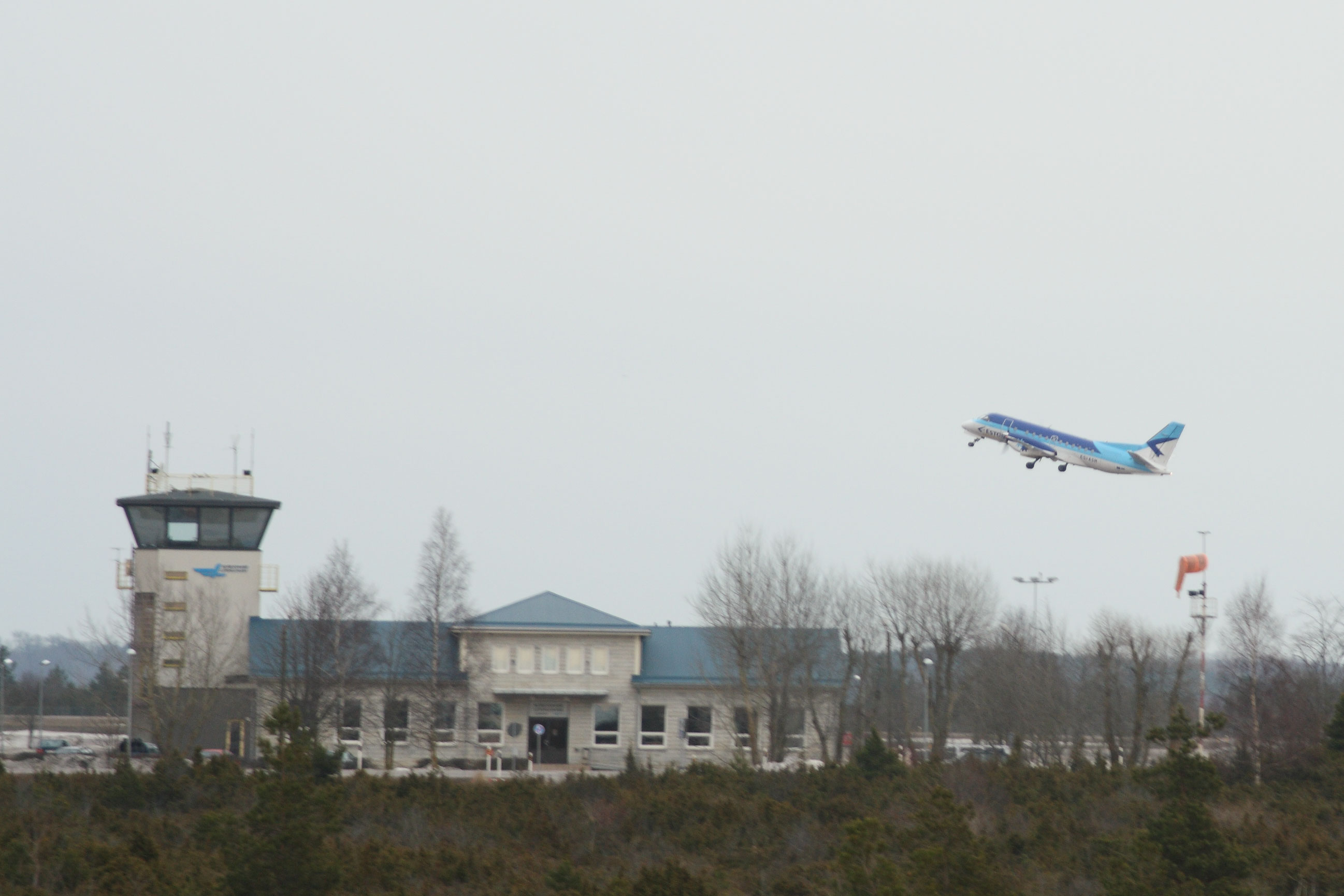 Kuressaare lennujaam ja Estonian Airi Kuressaare-Tallinna liinil lendav Saab 340